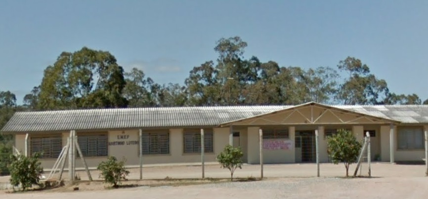 EMEF Martinho Lutero. São Lourenço do Sul